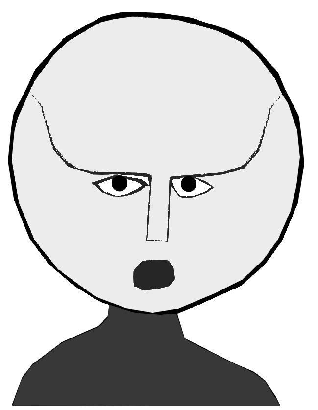 Représentation d'un des humanoïdes qu'aurait vu Maurice Masse dans son champ de lavande, le 1er juillet 1965. Travail inspiré d'un dessin réalisé par Pierre Giroud, paru dans La nouvelle vague des soucoupes volantes (Jean-Claude Bourret), Éditions France-Empire, 1974.